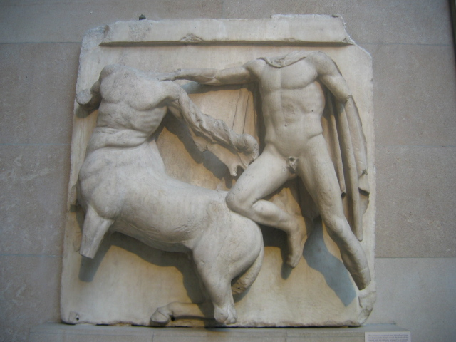 Elgin Marbles, British Museum, London : Métope sud, III, centaure